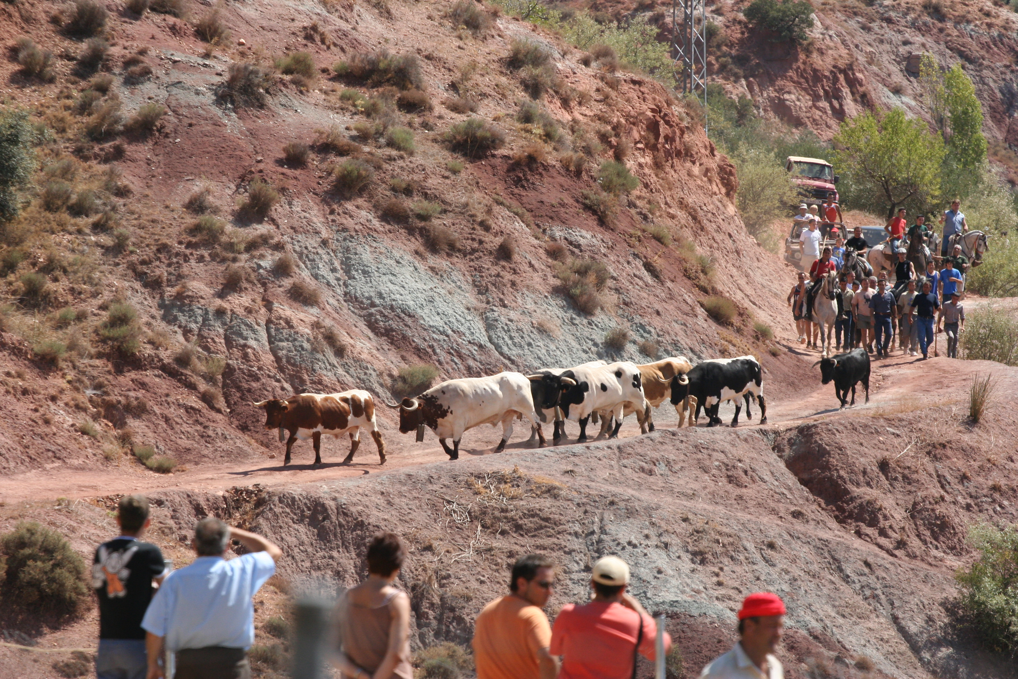 Fotografía de la comitiva que acompaña a las reses que protagonizan los tradicionales encierros de La Vegallera.